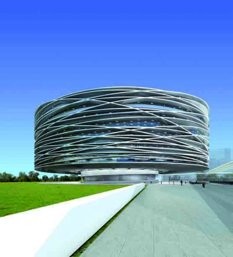 Futuro edificio del Judgado de lo Penal de madrid